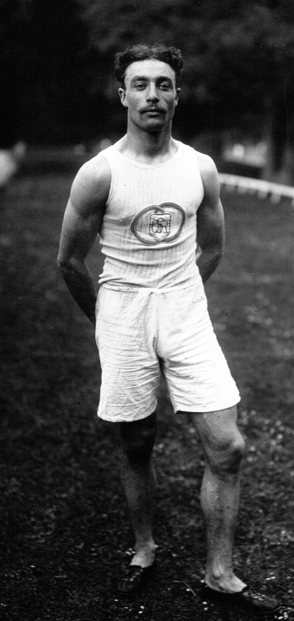 Les Jeux Olympiques : Lelong, en course : [photographie de presse] / Agence Meurisse